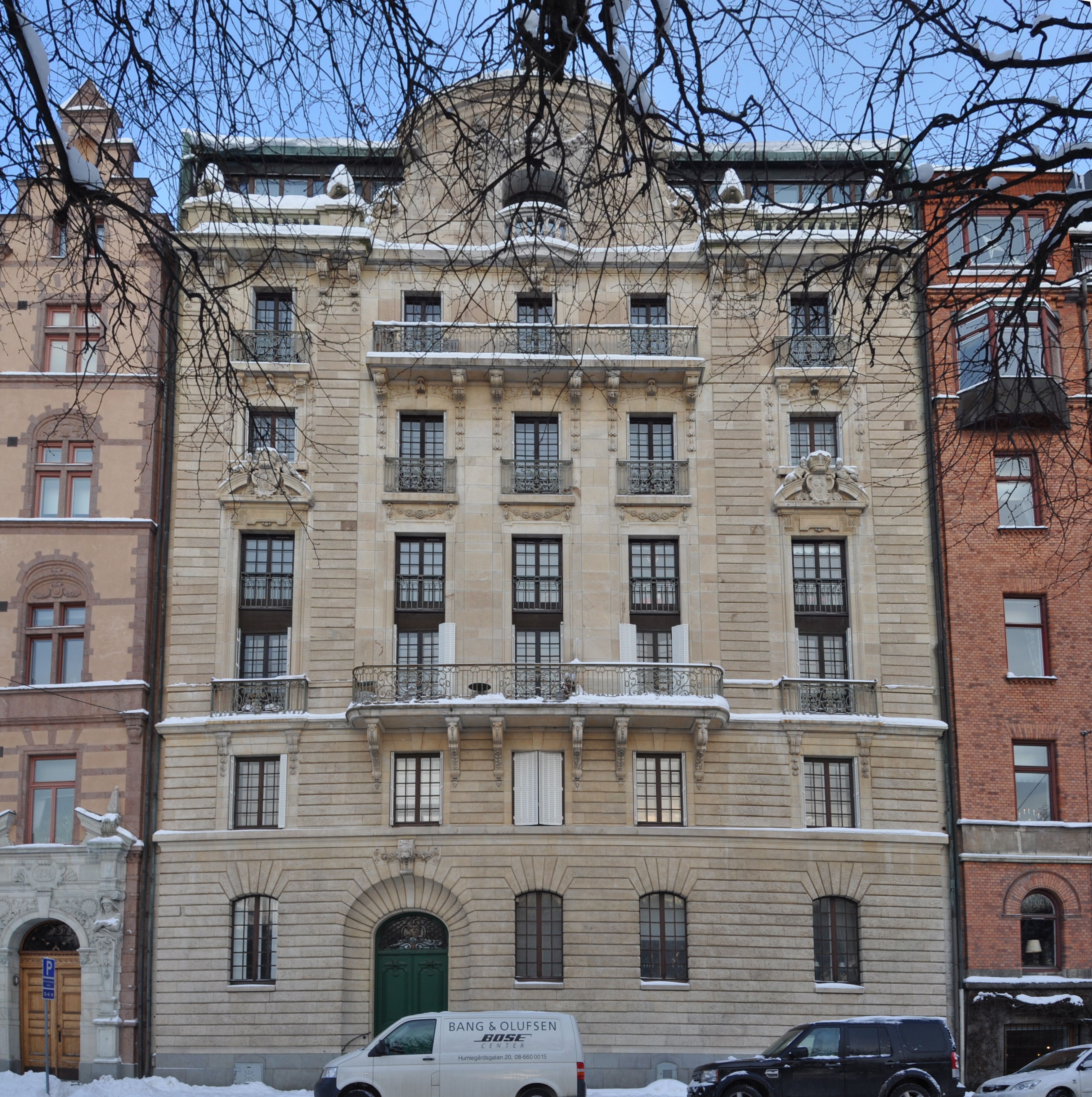 Strandvägen 55. Byggnadsår 1896-97, arkitekt Isak Gustaf Clason, byggherre Clarence von Rosen, byggmästare L Pettersson